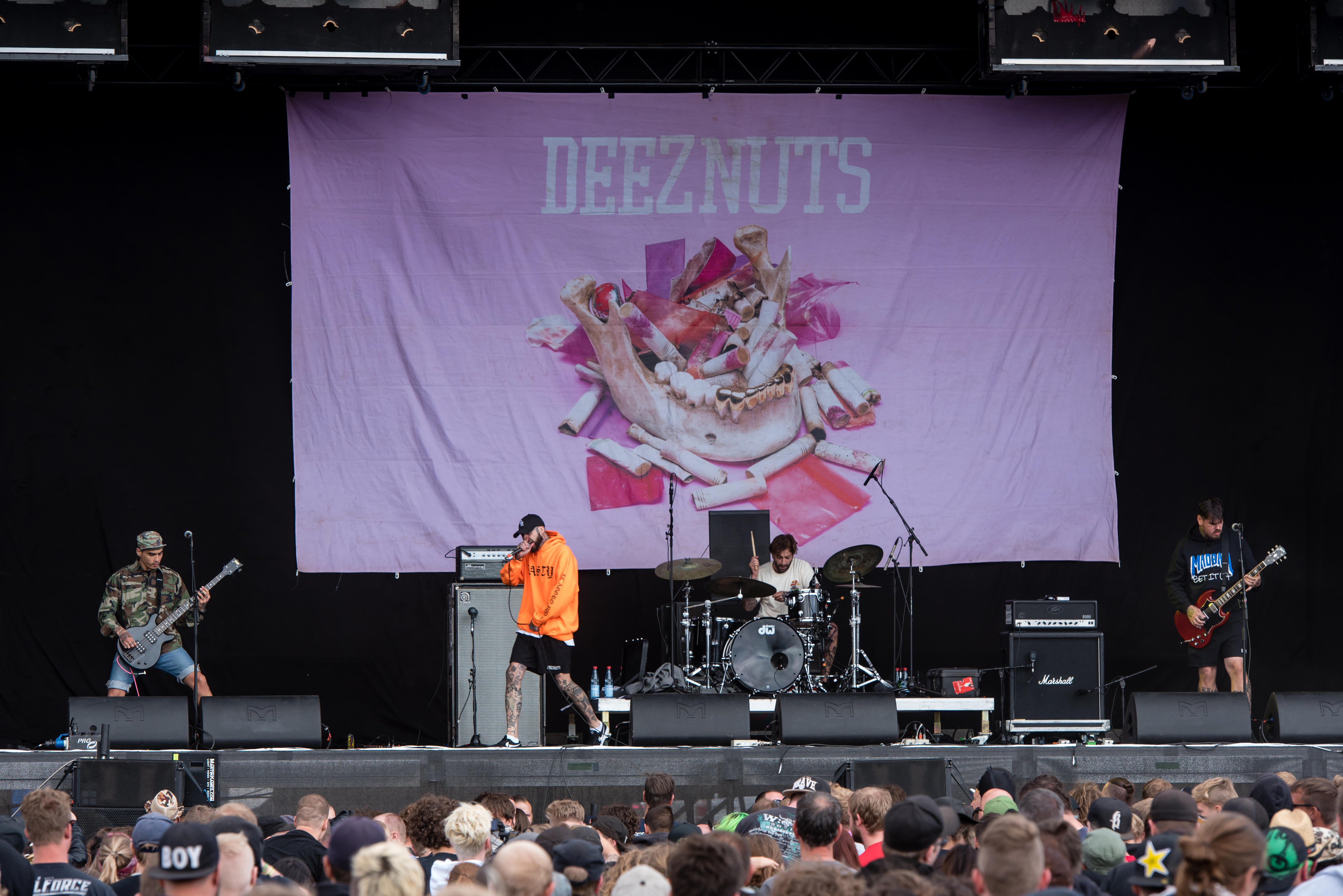 Deez Nuts auf dem Reload Festival 2018